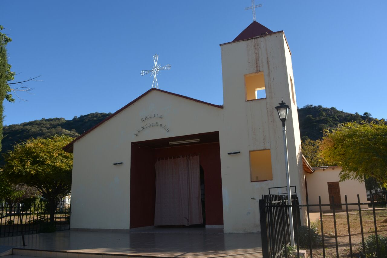 paisaje